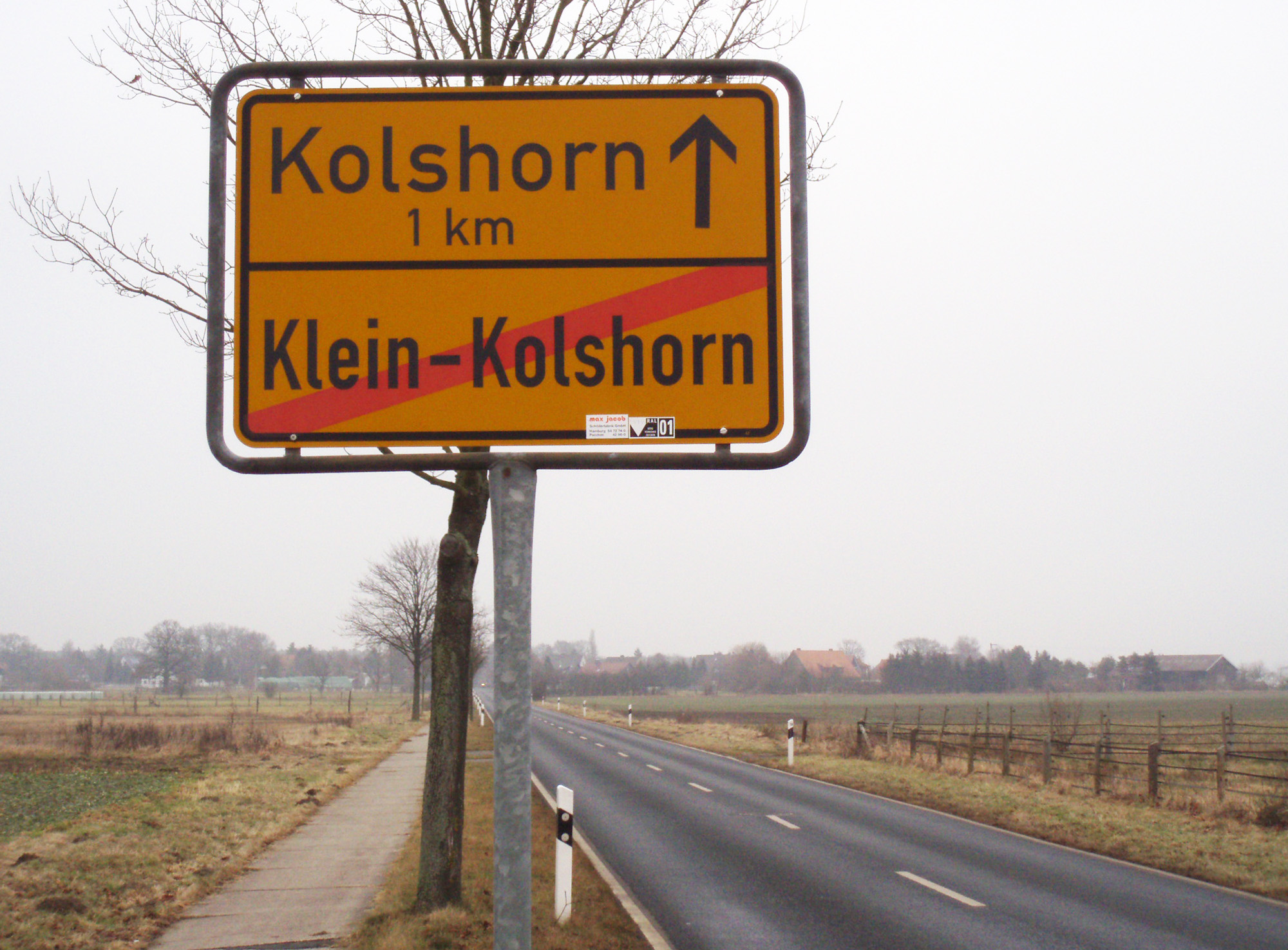 Ortsausgangsschild Klein-Kolshorn in der Region Hannover, Deutschland